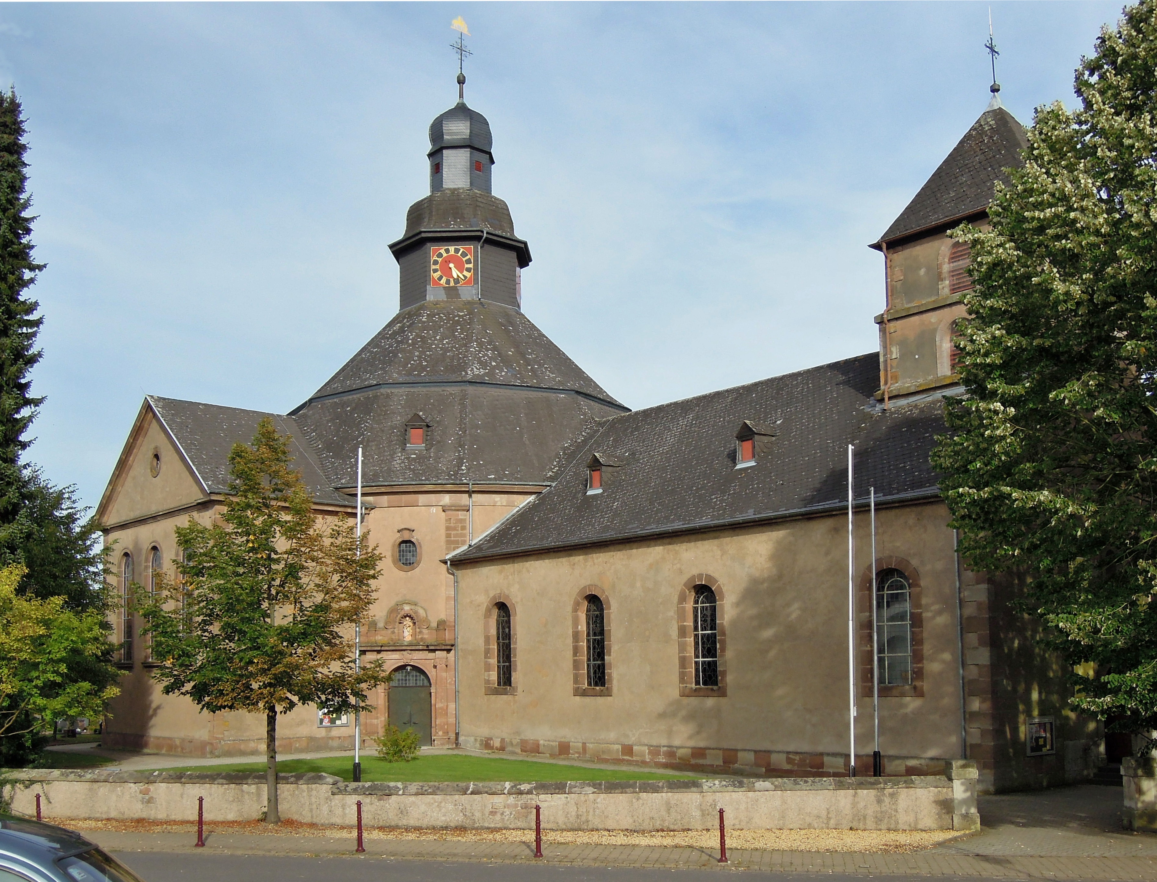 Dechantstraße, kath. Pfarrkirche St. Martin, 1758, 1912 Erweiterung von Peter Marx (Einzeldenkmal))